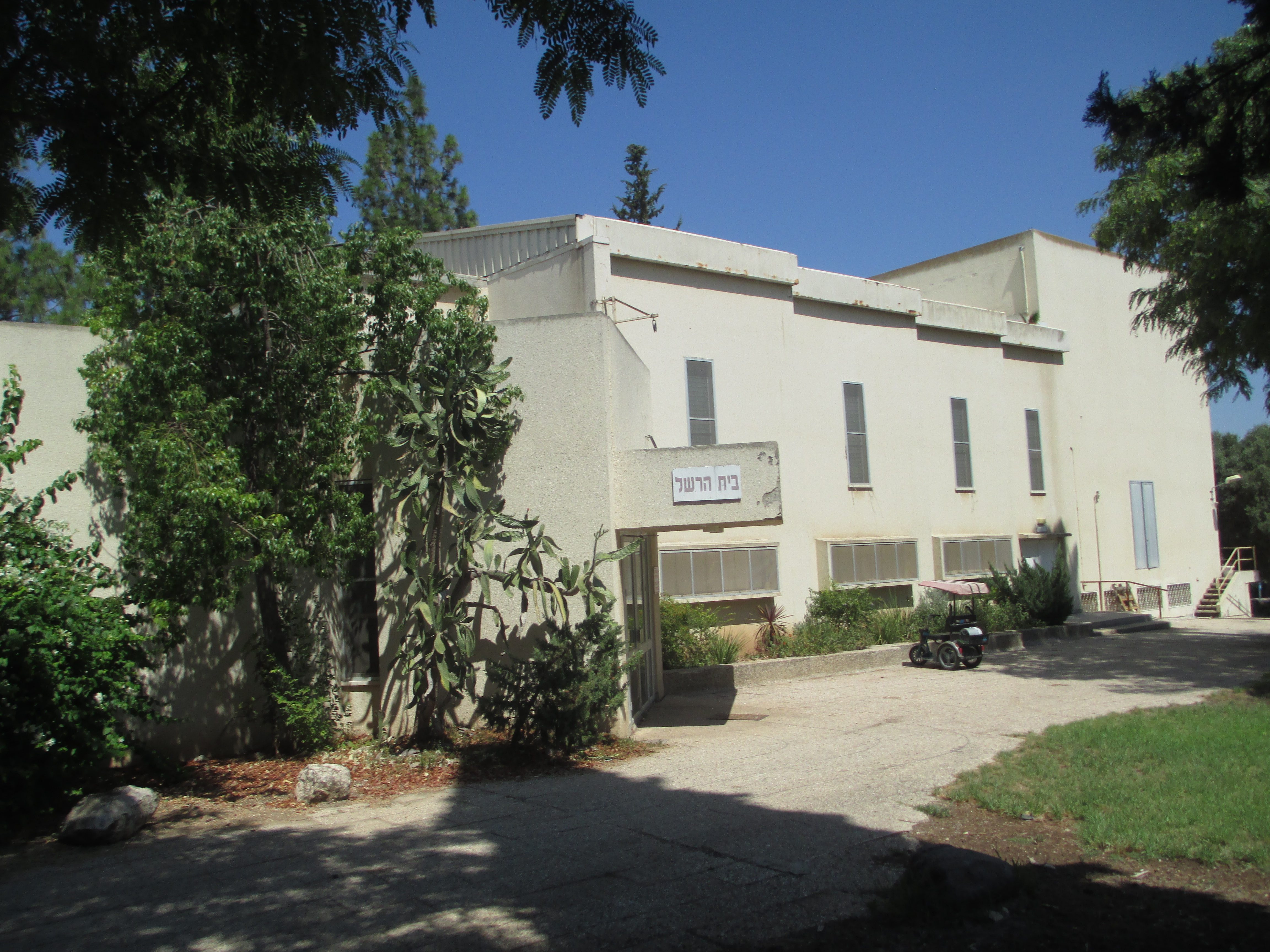 אולם בית הרשל בקיבוץ גבת